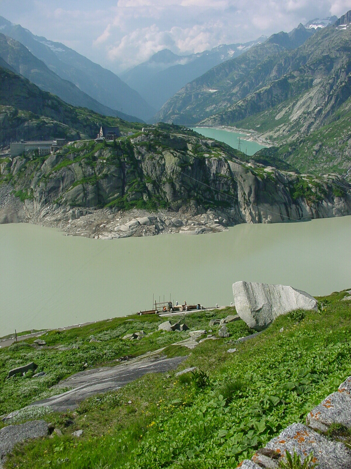 Grimselpass Ansicht